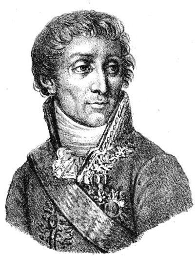 Fouché de Nantes